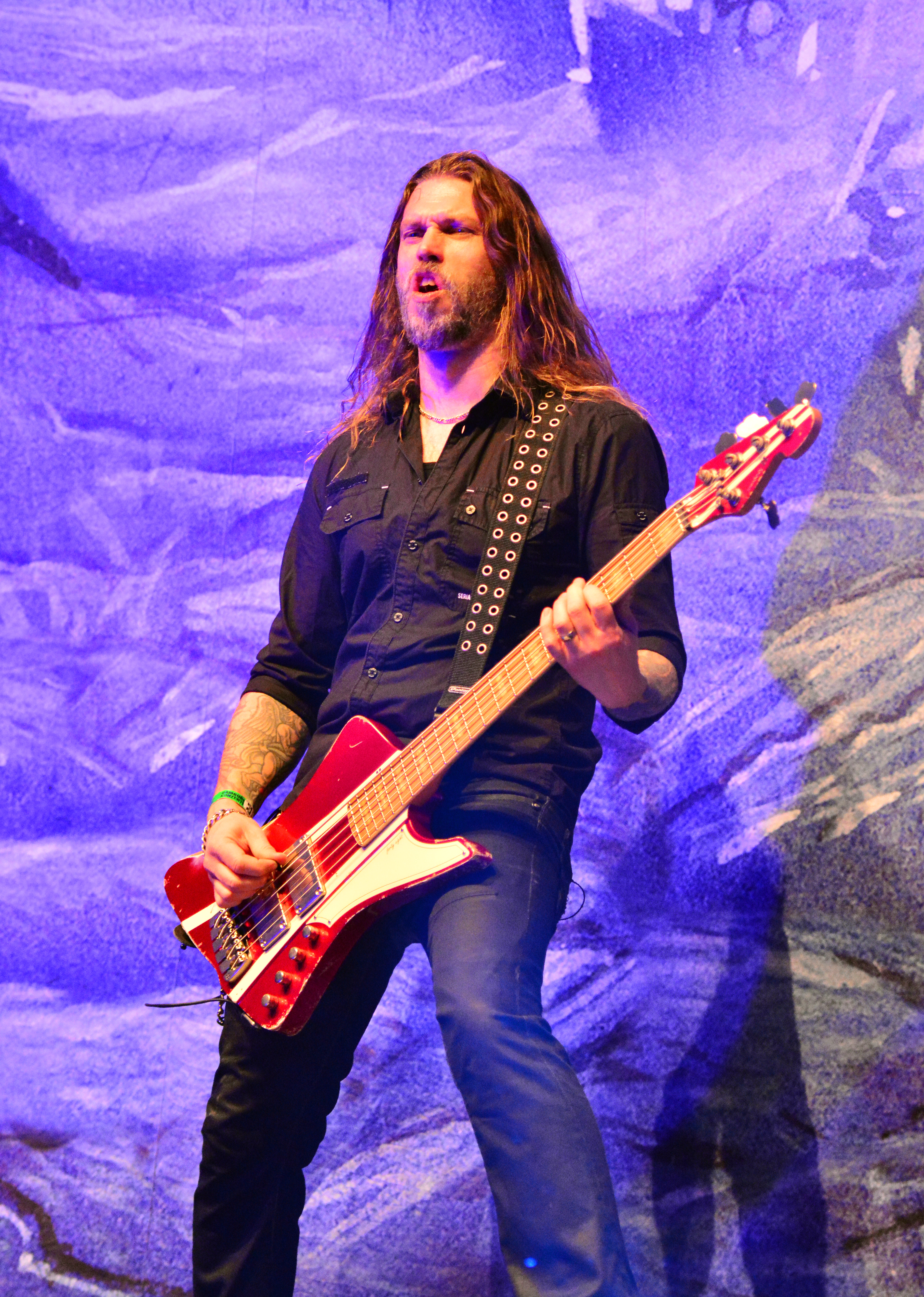 Hammerfall beim Waterkant X-Mas Bash 2015 in der Sporthalle Hamburg